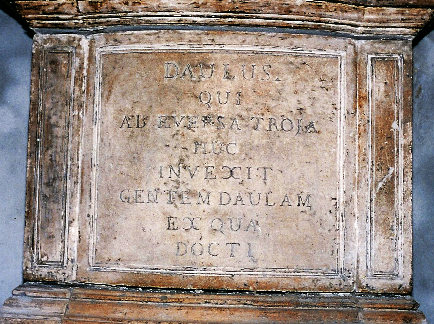 Basamento della statua di Cono Dotti con relativa iscrizione